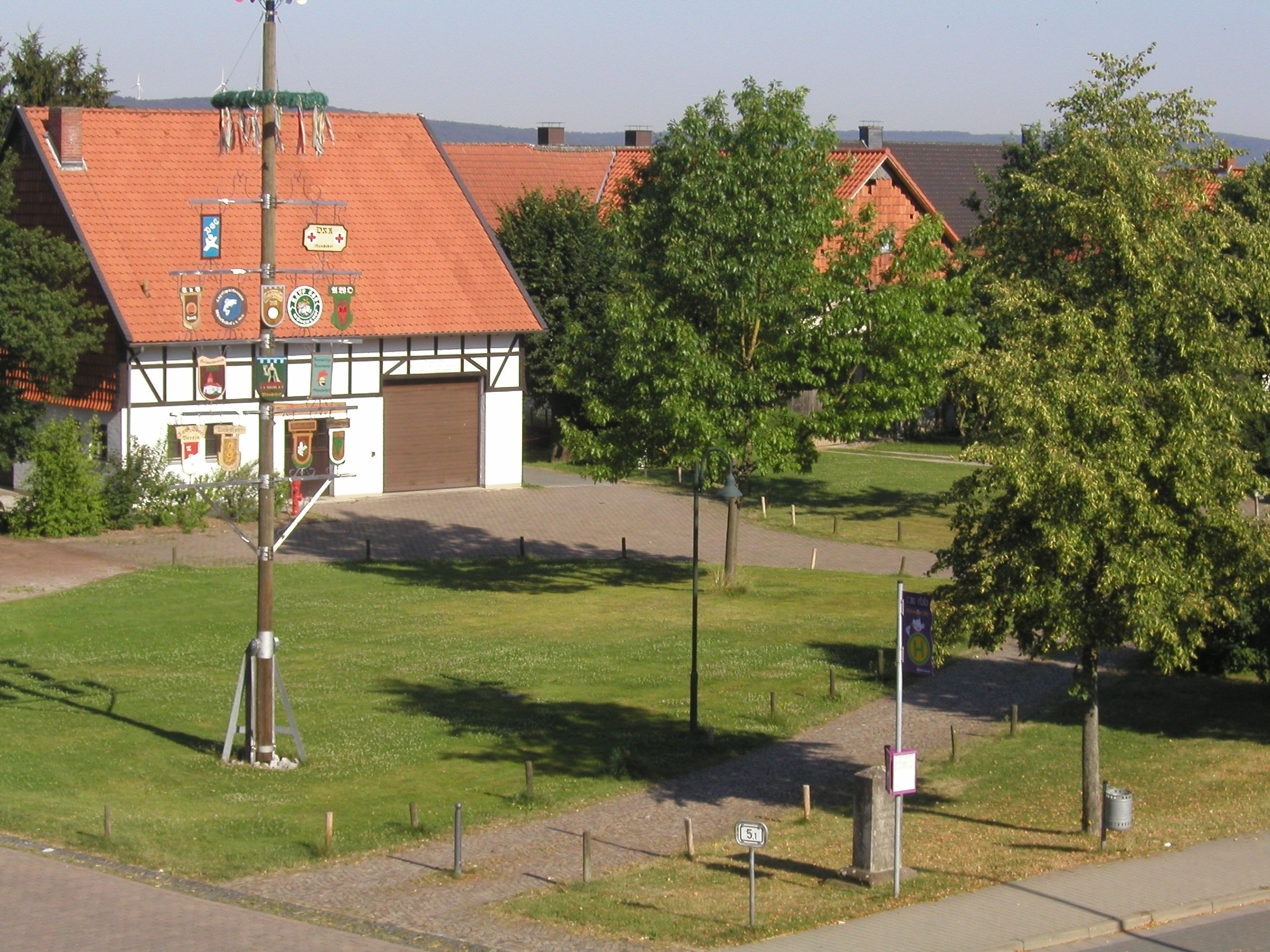 Dorfplatz.jpg